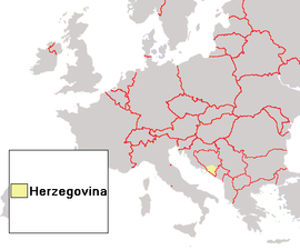 mapa de Herzegovina en Europa